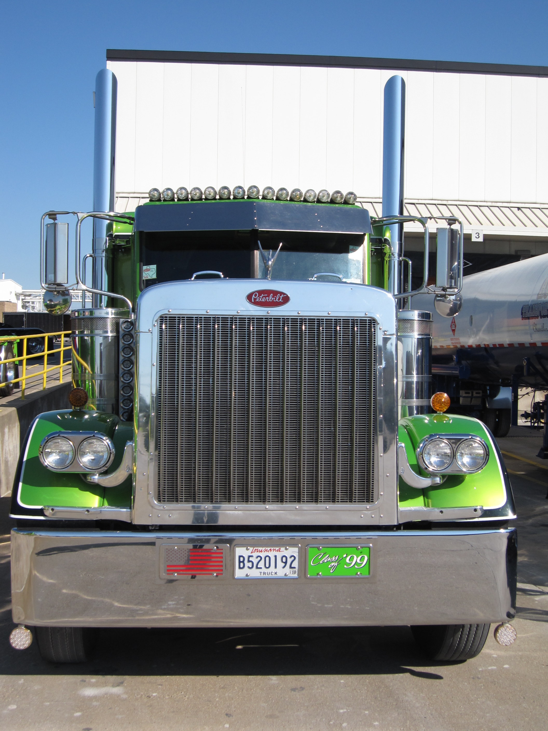 Peterbilt truck